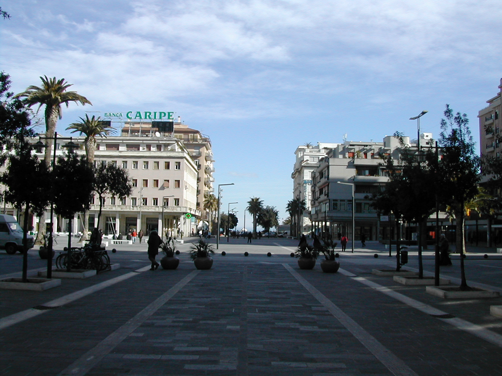 Piazza Salotto Pescara